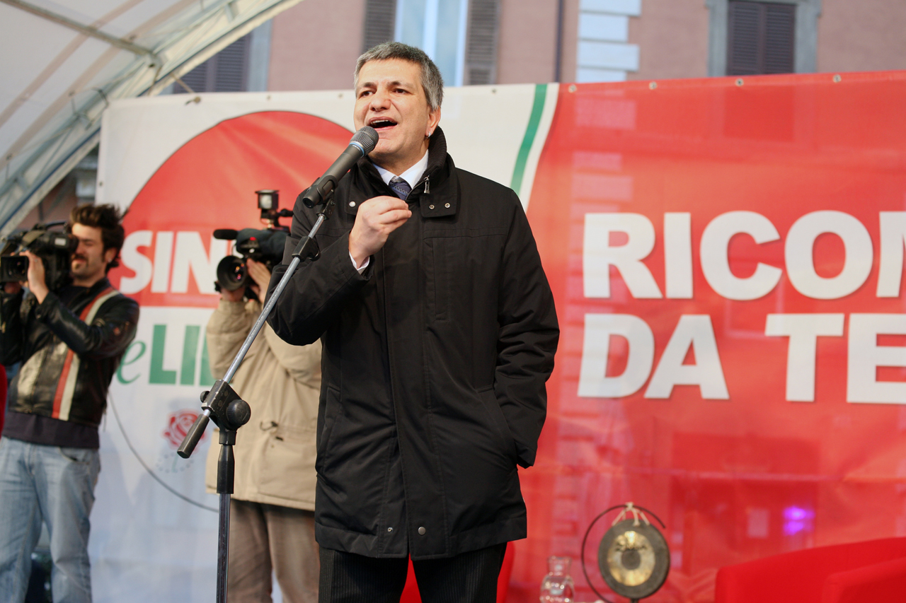 Nichi Vendola, Presidente della Puglia ed esponente di spicco di Sinistra e Libertà, parla a Piazza Farnese (Roma) il 21 Marzo, in occasione della presentazione della lista.